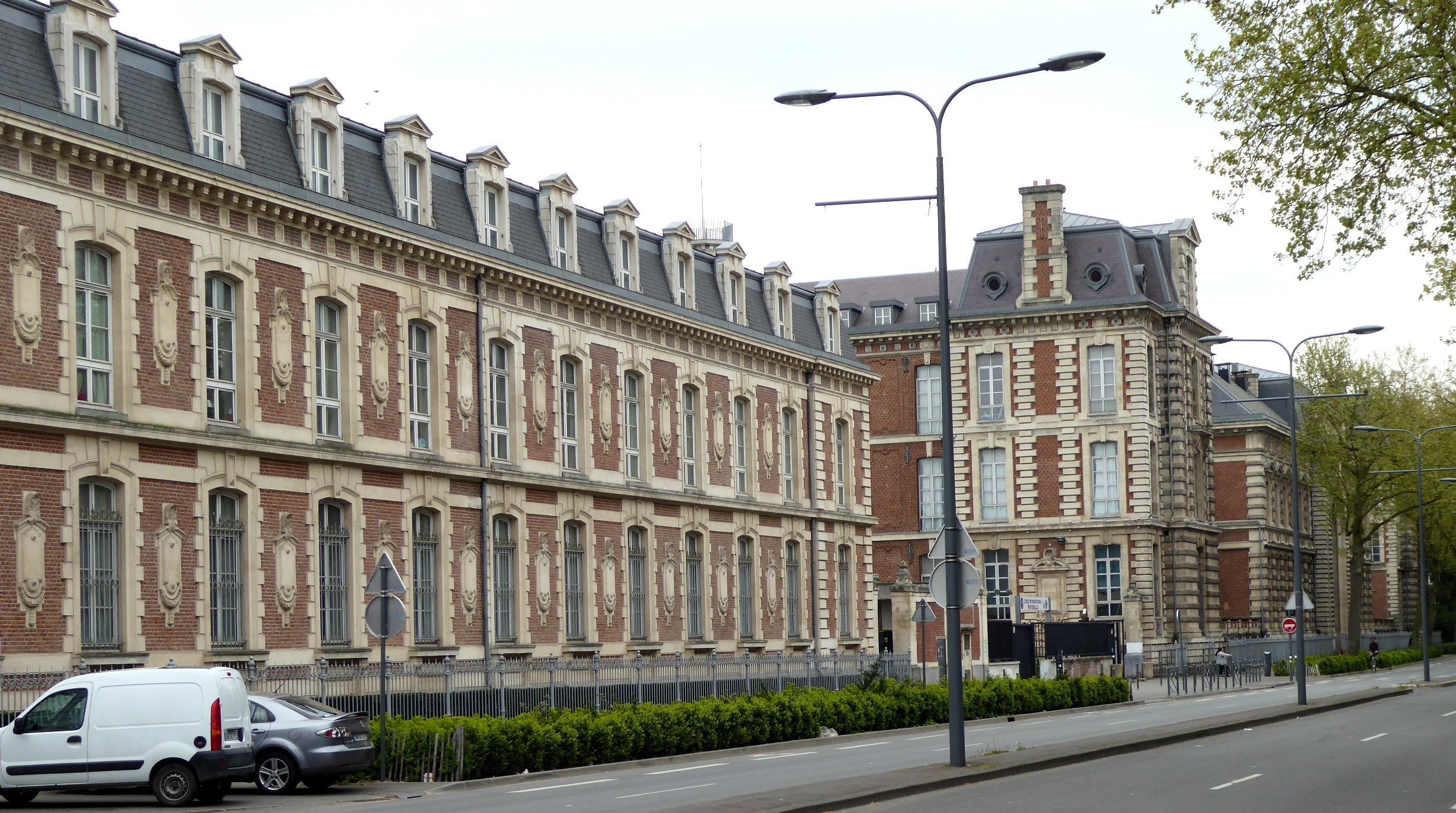 Lycée Montebello façade